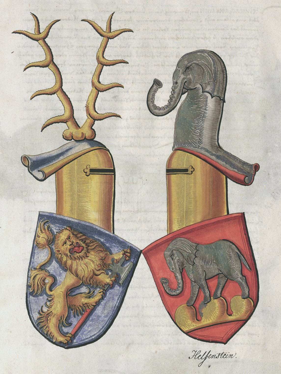 Wappen aus der Zimmerischen Chronik, Handschrift B, Württembergische Landesbibliothek Stuttgart, Cod. Don. 580a, S. 33, Allianzwappen Zimmern / Helfenstein